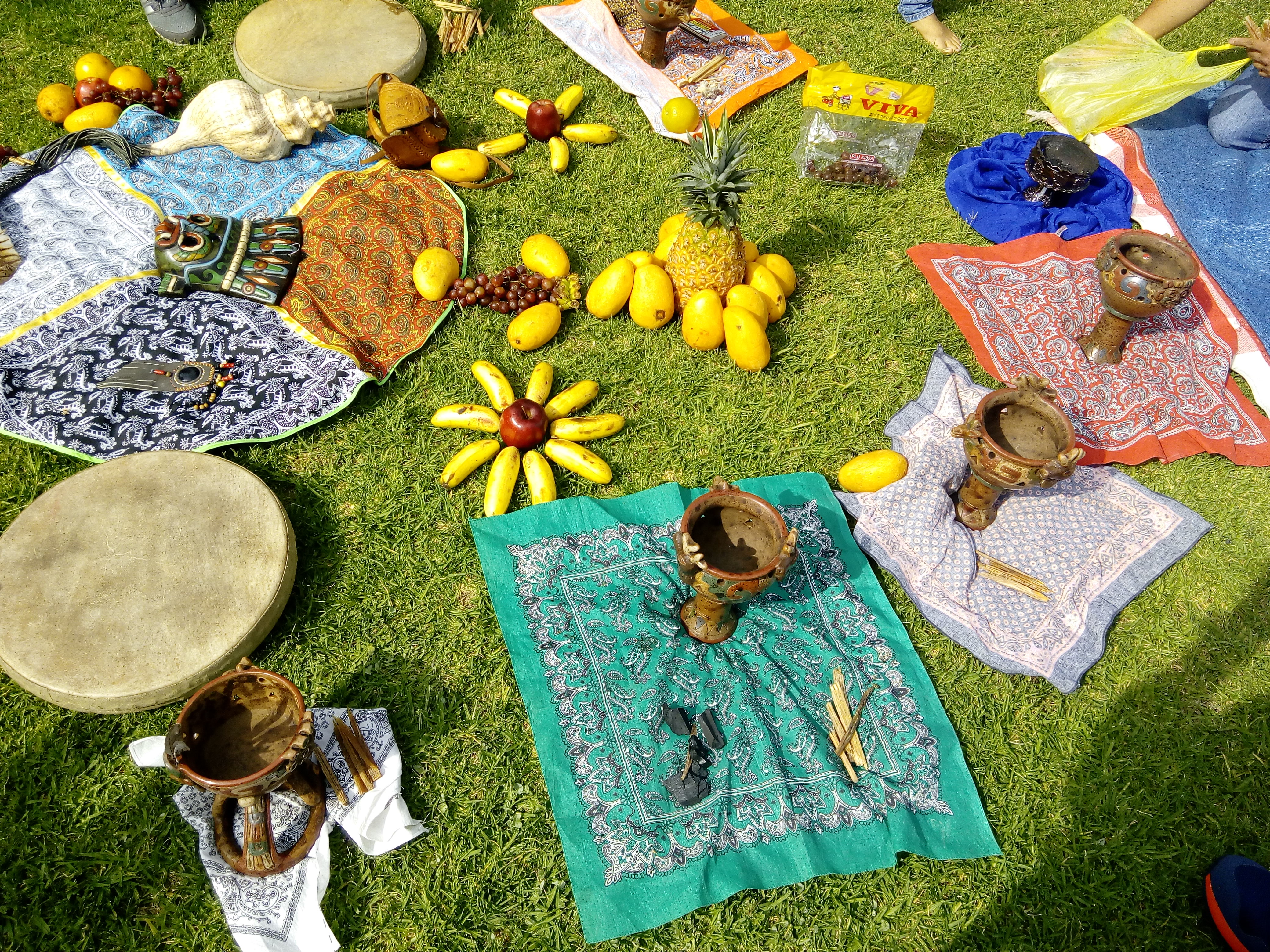 Tlalmanalli tradicional